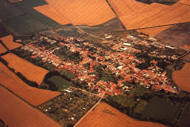 Luftbildaufnahme der Gemeinde Günstedt